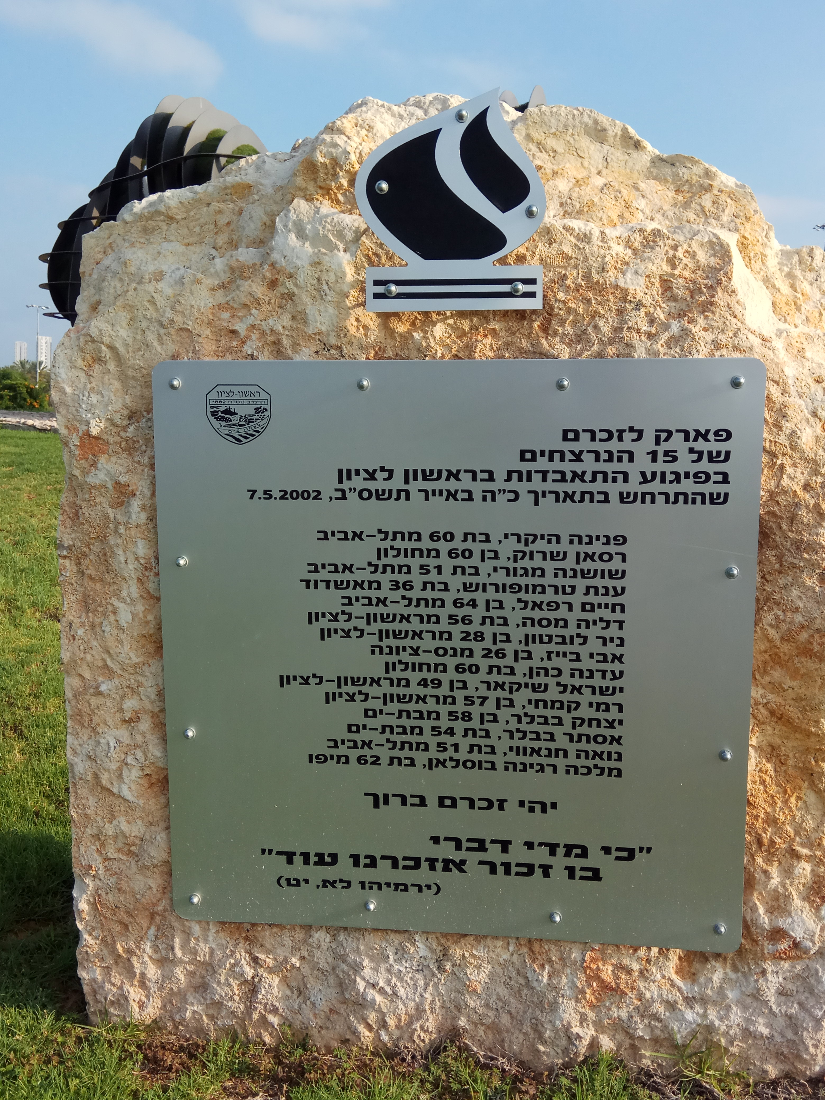 אנדרטה לנרצחי הפיגוע במועדון שפילד בראשון לציון